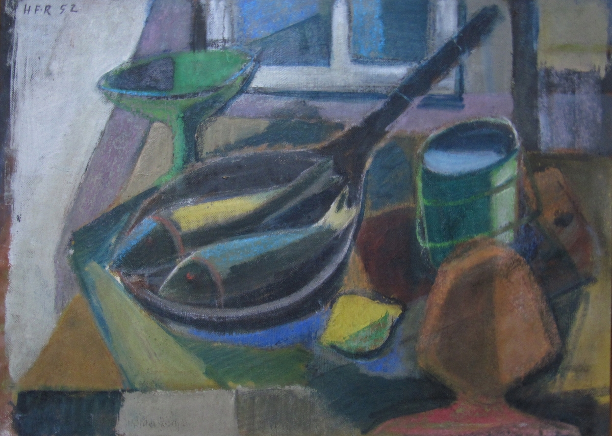 Stillleben, Gemälde, 50er Jahre, Hannoveraner Künstler, Hannover